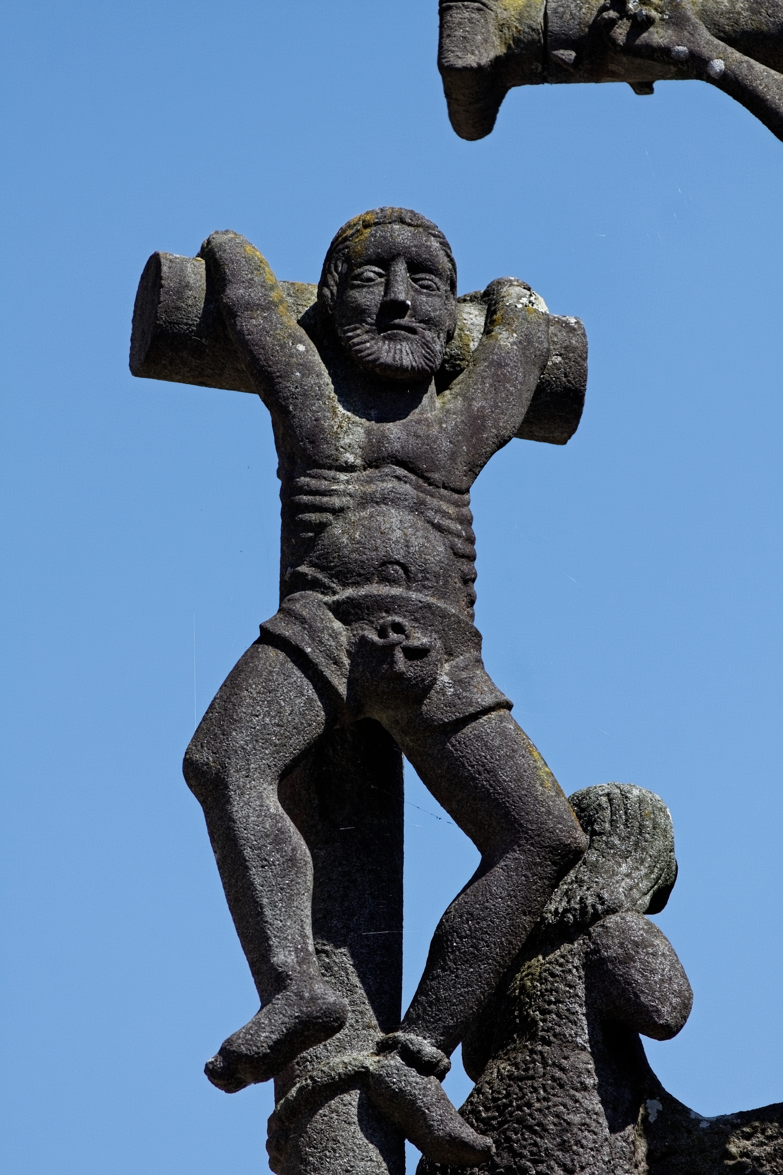 Vue de l'église Notre-Dame de Lampaul-Guimiliau.